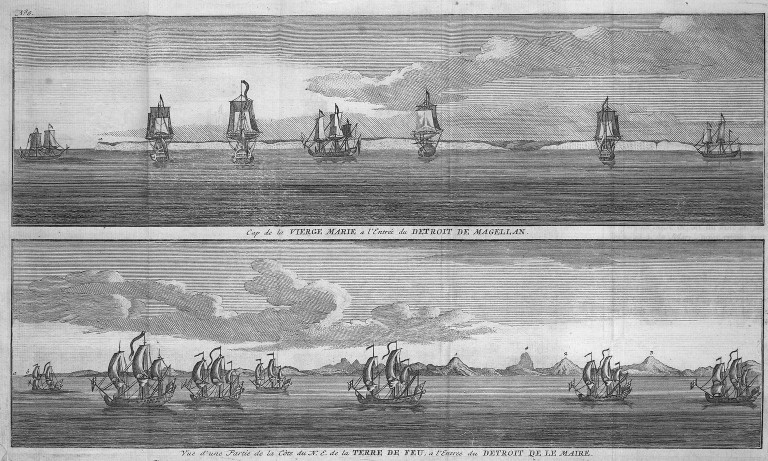 [Illustrations de Voyage autour du monde] Auteur : George Anson Éditeur : Henri-Albert Gosse et Compagnie (Genève) 1750